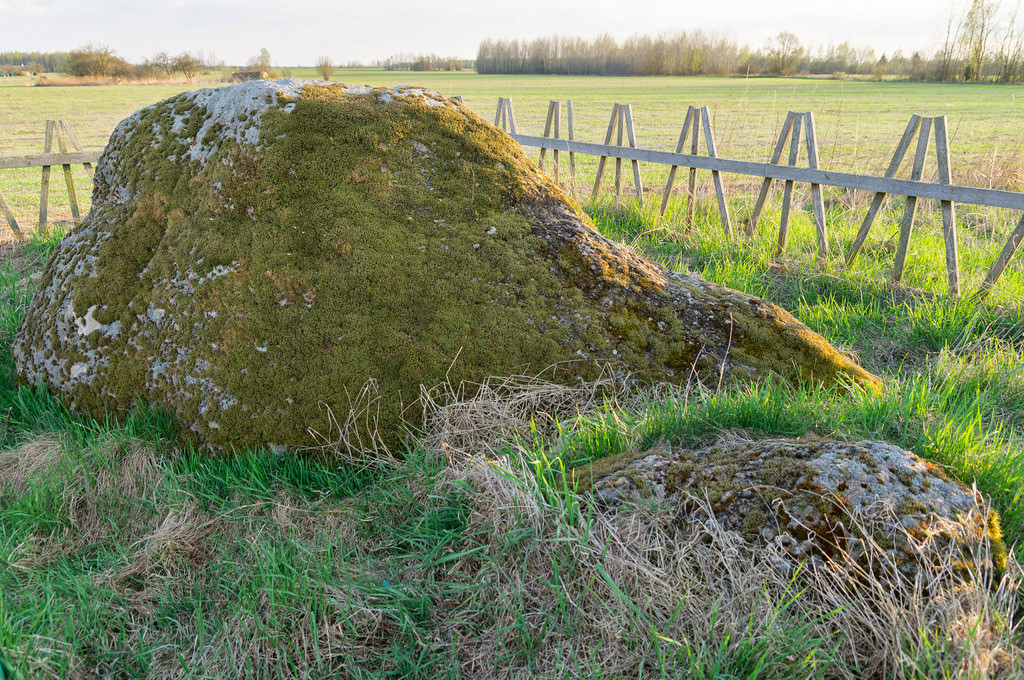 «Вялікі камень» мішуцкі (Перуноў камень)